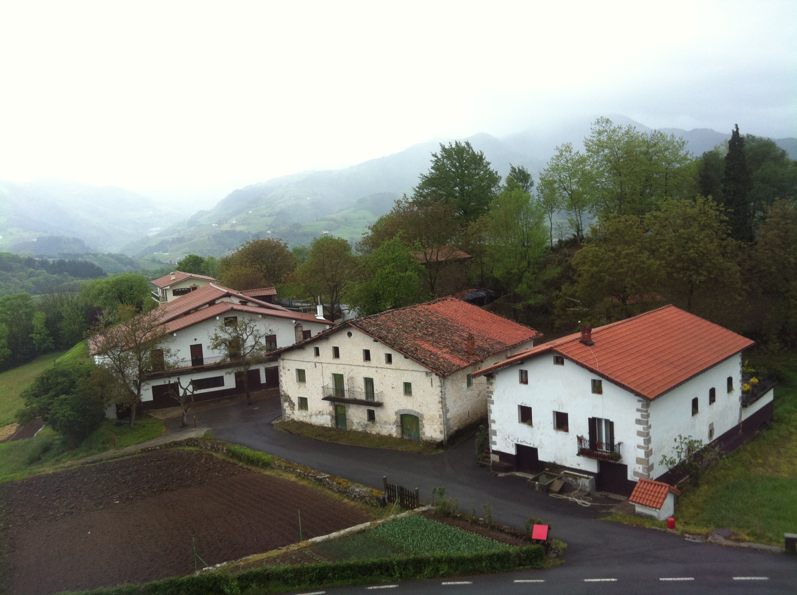 Leaburu village in Basque Country